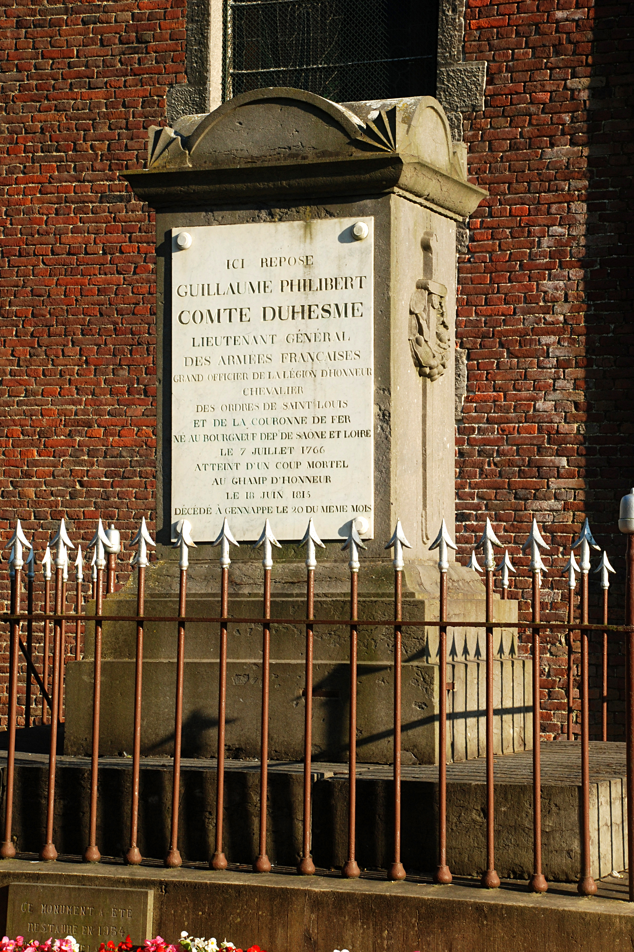 Belgique - Brabant wallon - Genappe - Ways - Mausolée Duhesme (tombe du Général Duhesme, mort des suites des blessures encourues à la bataille de Waterloo)